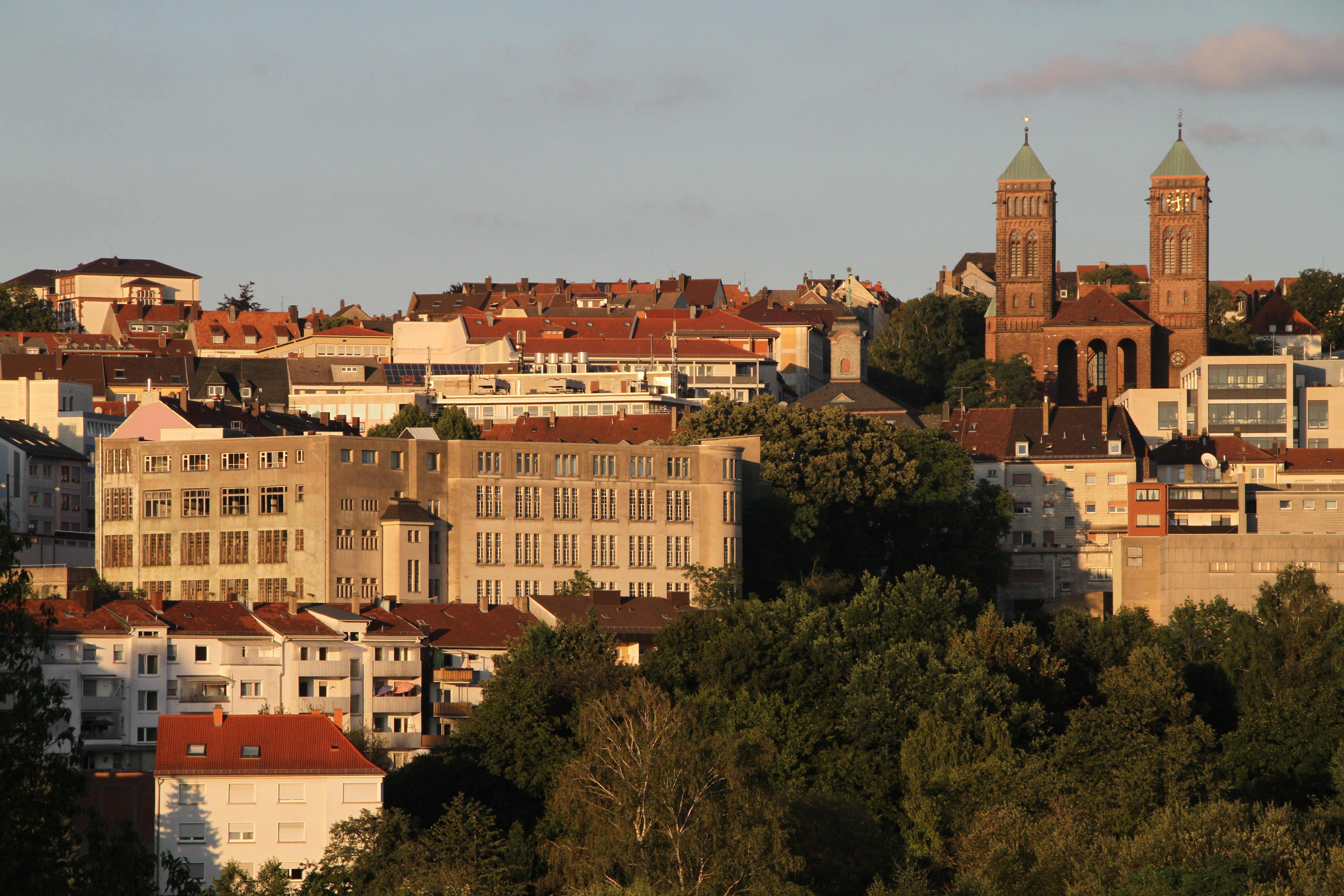 Pirmasens, Panorama.